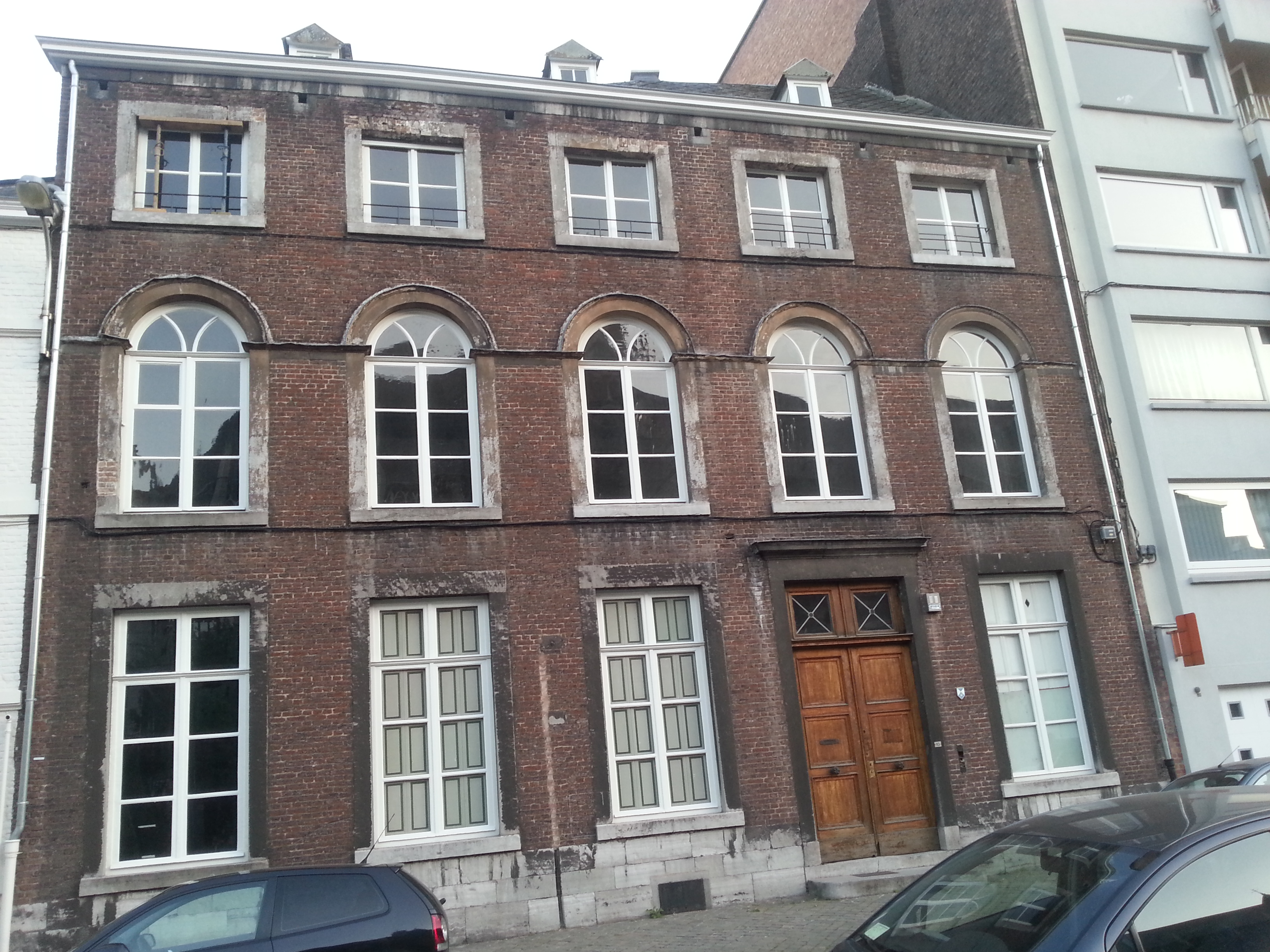 Immeuble - Totalité de l'immeuble sis place Emile Dupont, no 10